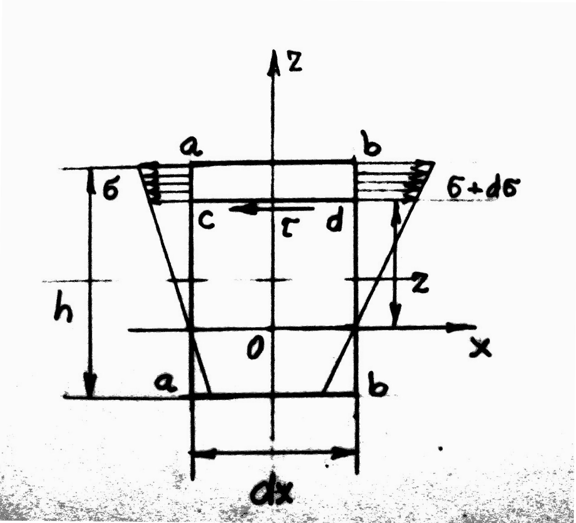 Naprężenia w belce poprzecznie zginanej